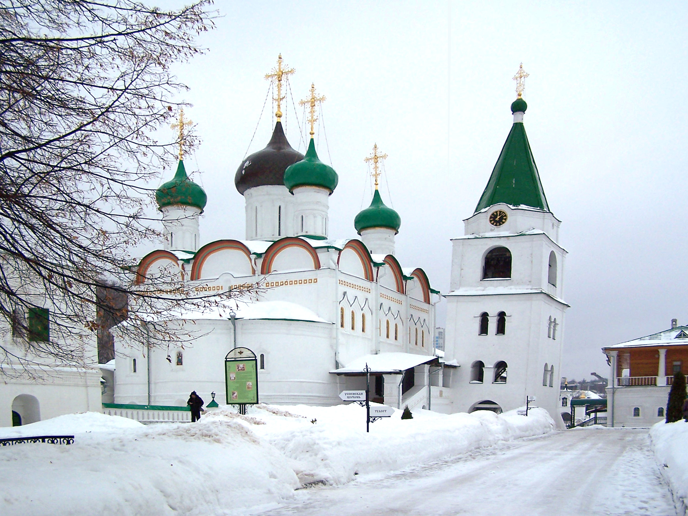 Колокольня (a la Piza)